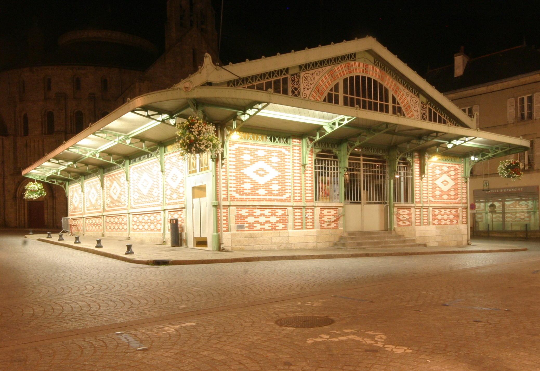 Les halles de basse-ville à Quimperlé.